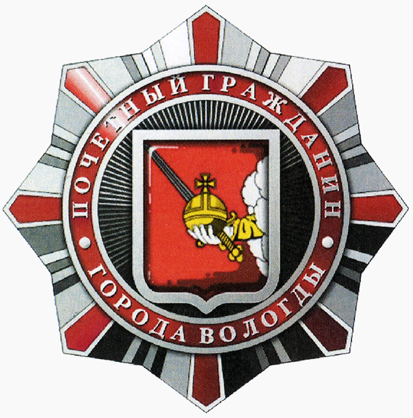 Почётный гражданин города Вологды